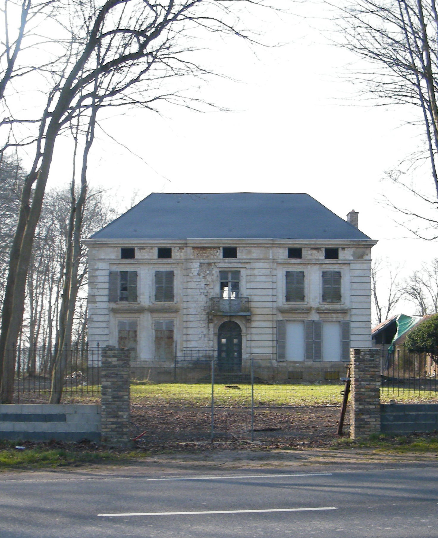 Le château blanc sur l'ex-RN1, en sortant de Bernay-en-Ponthieu mais sur le territoire de la commune d'Arry, Somme, Fr.